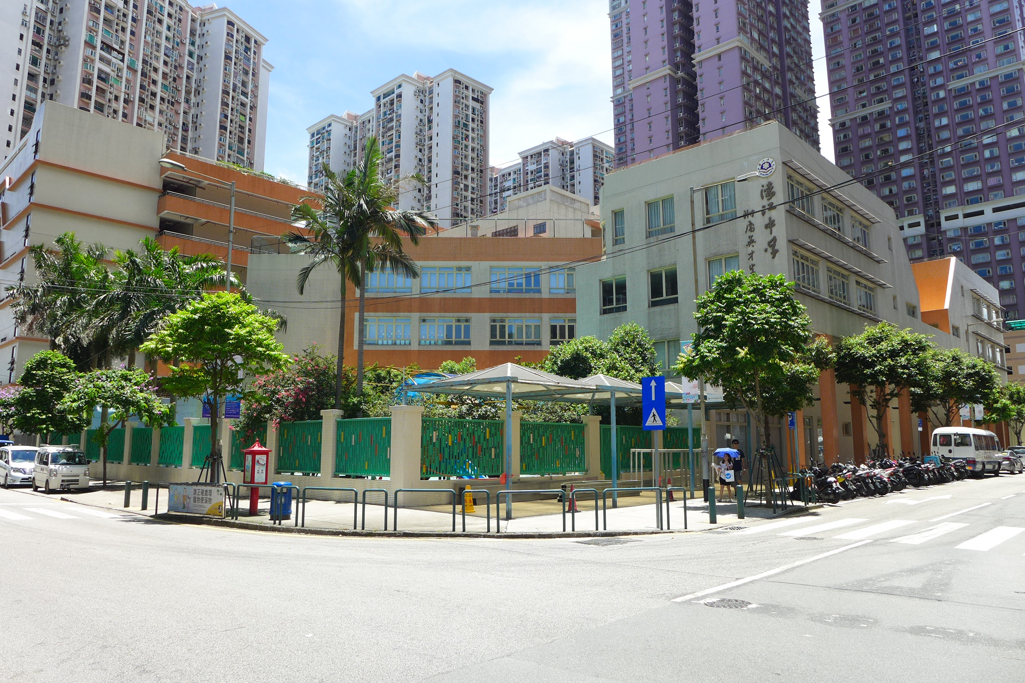 濠江中學(氹仔分校)